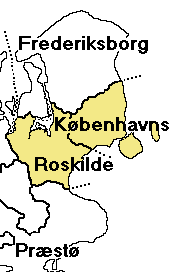 Københavns Amt after 1808, Denmark. Map by Svend-Erik Christiansen